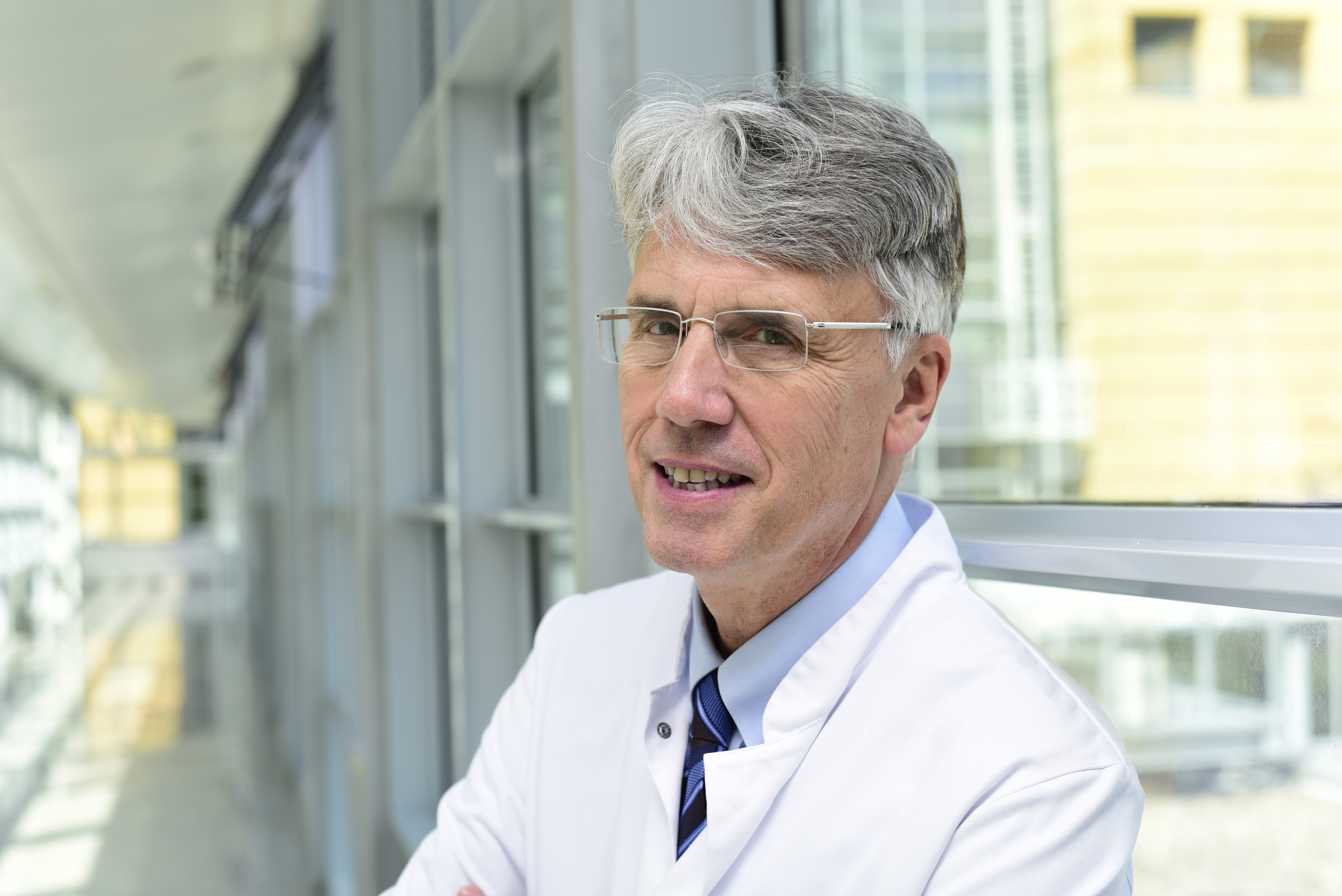 Portraitfoto